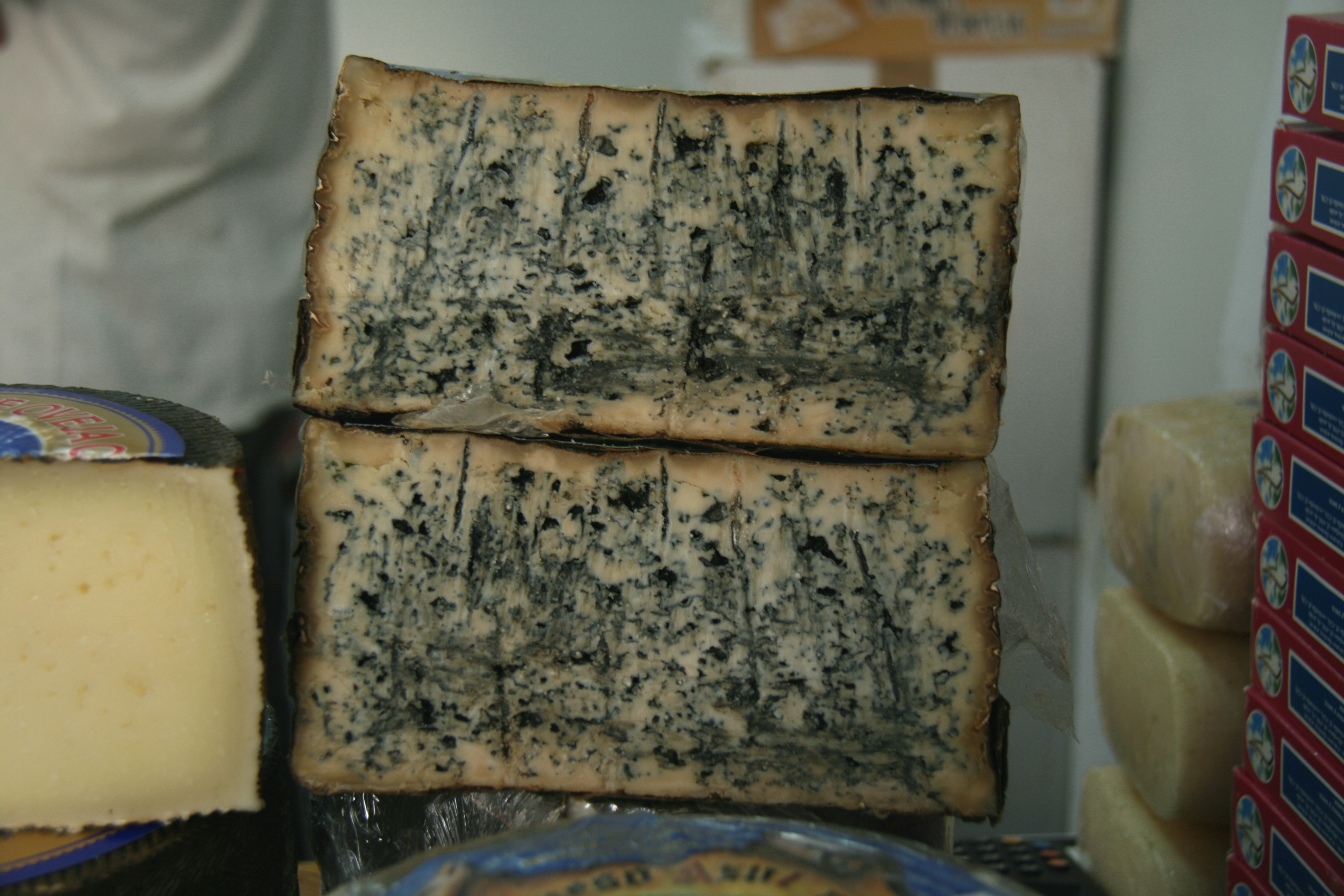 Queso de Valdeón - Picos de europa